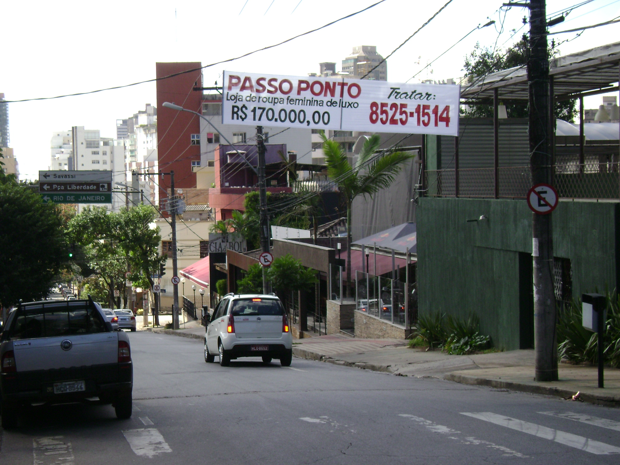 Faixa indicando ponto comercial a ser passado, entre os bairros Carmo e Cruzeiro.